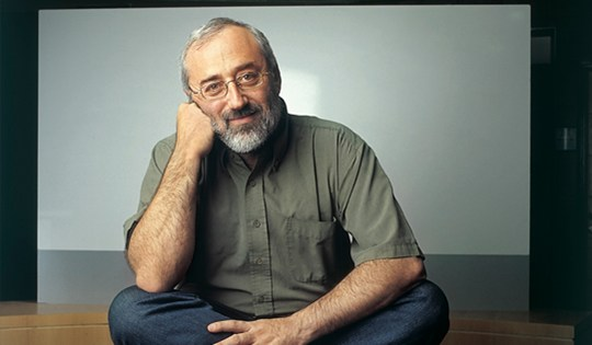 פרופסור לפסיכולוגיה מריו מיקולינסר